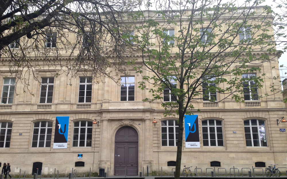 Bâtiment de la faculté de Droit de Bordeaux, inauguré le 20 novembre 1873 Après le déménagement de la faculté à Pessac, il accueille certains enseignements spécialisés. Rénové en 2011, il devient le pôle juridique et judiciaire de l'université de Bordeaux